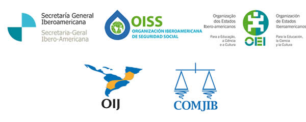 Logos de los organismos internacionales (la Secretaría General Iberoamericana –SEGIB-, la Organización de Estados Iberoamericanos para la Educación, la Ciencia y la Cultura –OEI-, la Organización Iberoamericana de Seguridad Social –OISS-, el Organismo Internacional de Juventud para Iberoamérica –OIJ- y la Conferencia de Ministros de Justicia de los Países Iberoamericanos –COMJIB-), que integran el Sistema Iberoamericano.